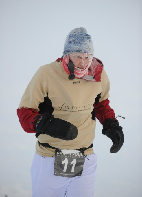 Peter Jensen løber på Nordpolen